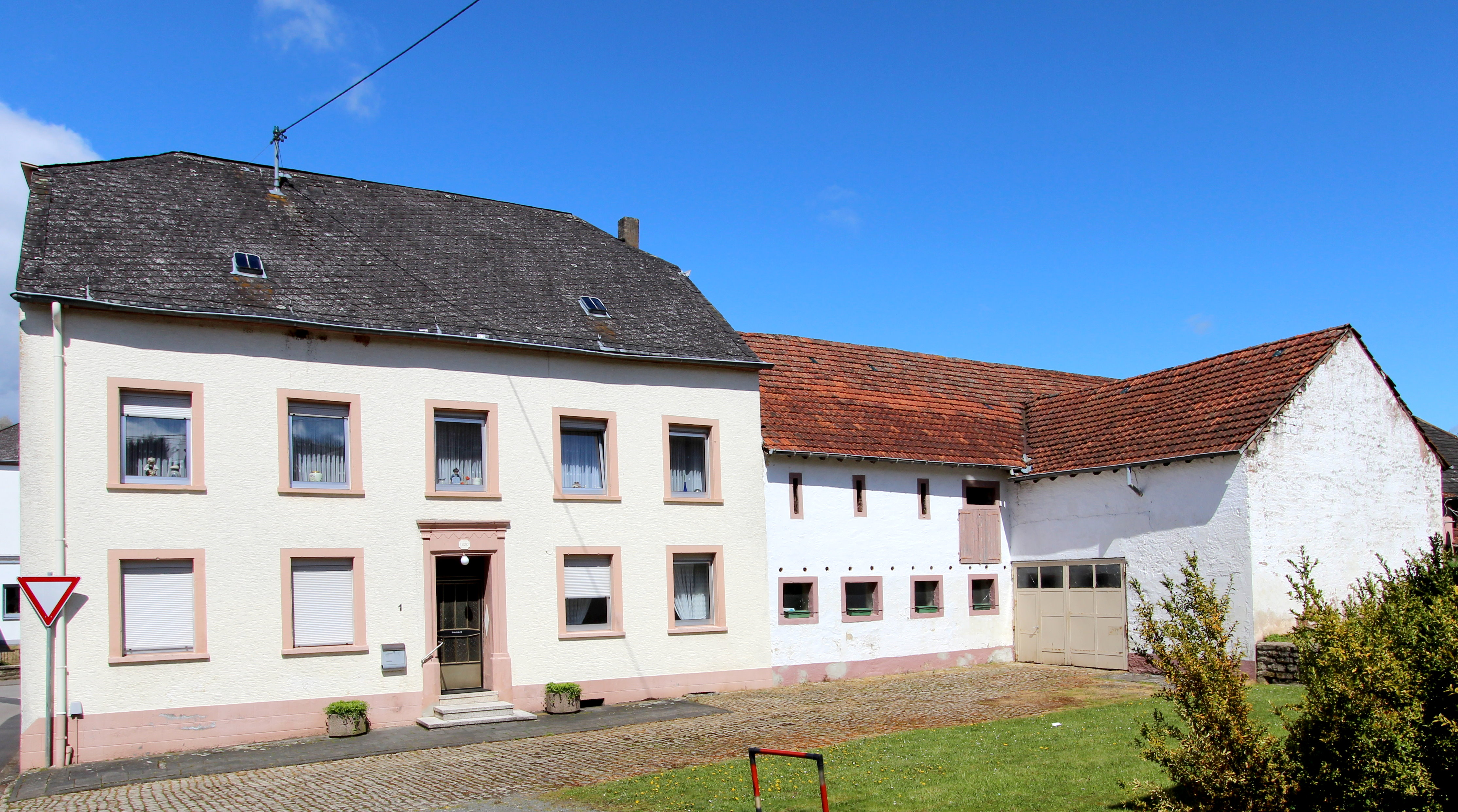 54636 Baustert, Brunnenstraße. Aufnahme von 2016